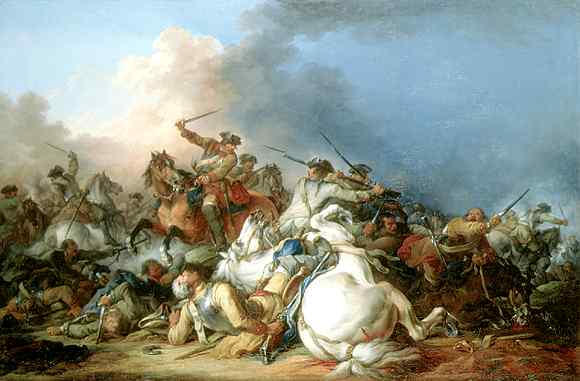 Battaglia di cavalleriatitle QS:P1476,it:"Battaglia di cavalleria" label QS:Lit,"Battaglia di cavalleria"